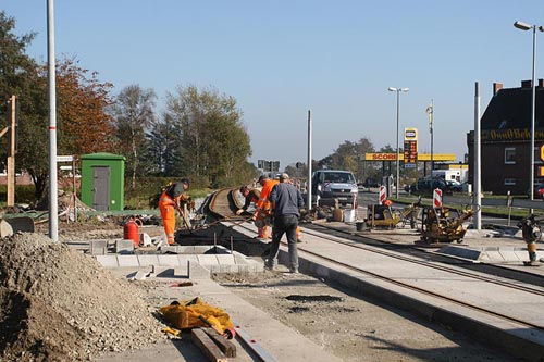 Georgsheil, Kreuzung der B72 mit der Bahnstrecke